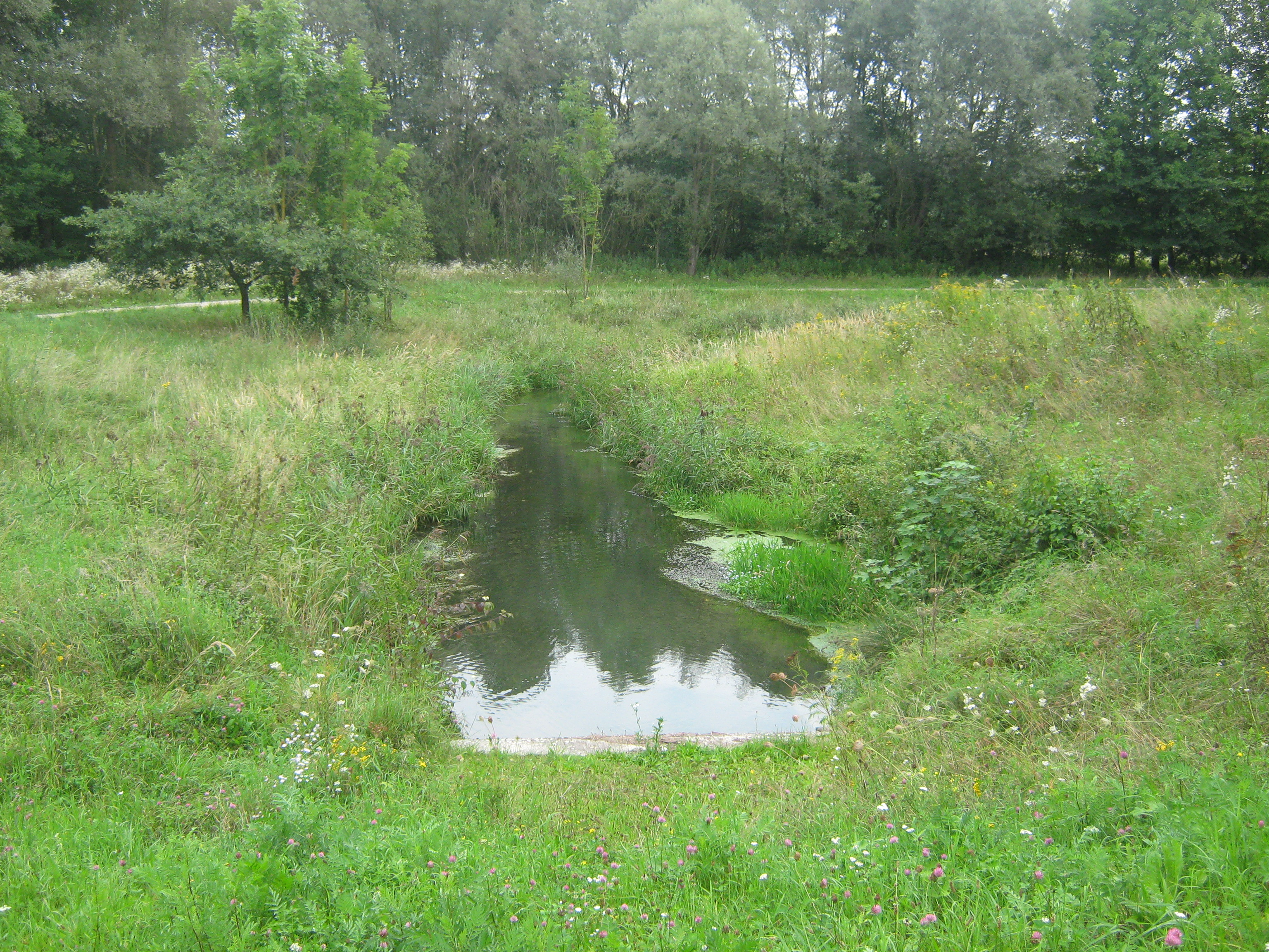 Gänsmühlbach in Fließrichtung nach Durchlauf durch den Hochwasserdamm, die gleich nach der Ausleitung aus dem linksseitigen Isar-Sickergraben erfolgt, bei Gottfrieding(erschwaige)